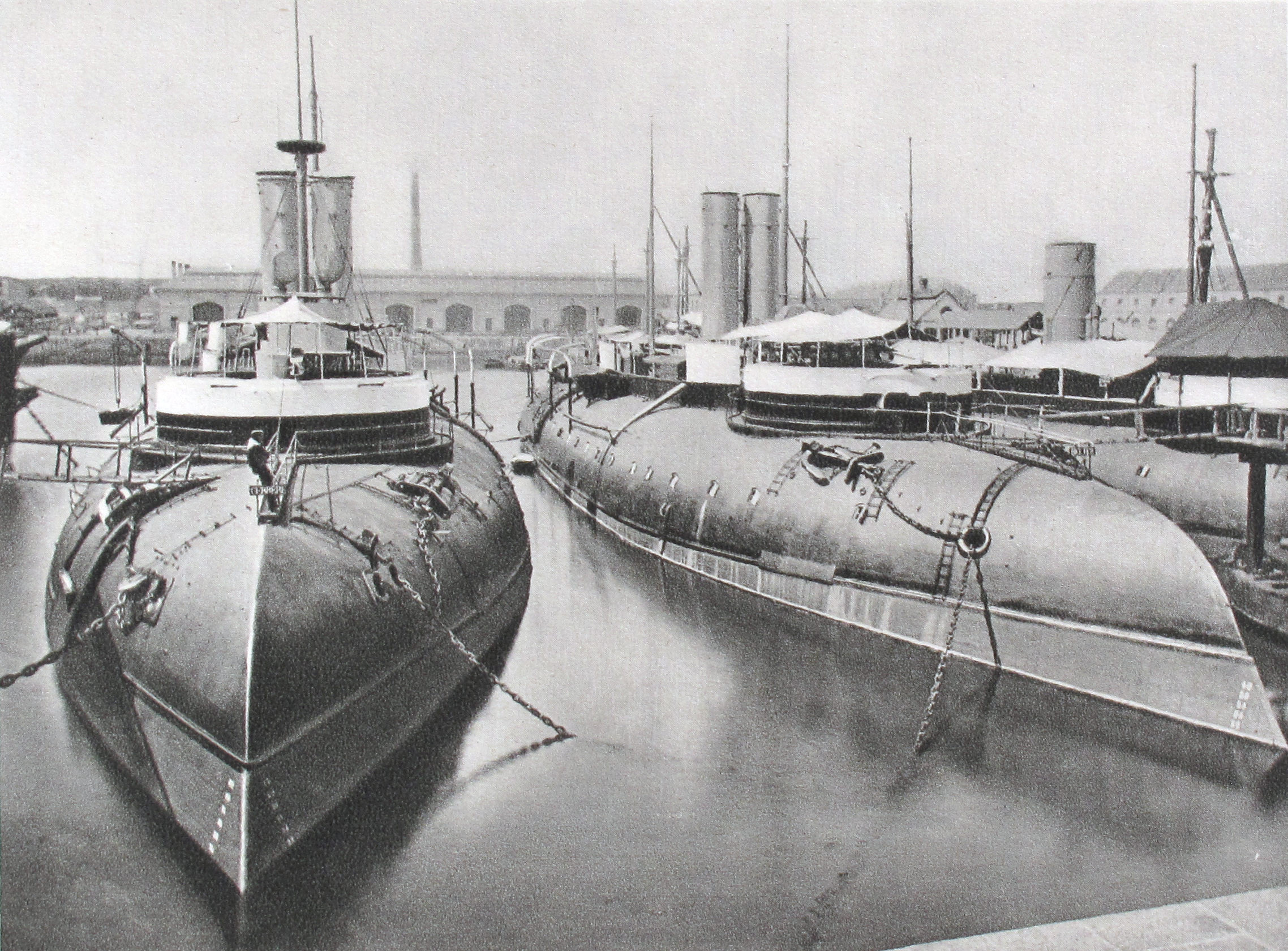 French ironclads Cerbère and Bélier